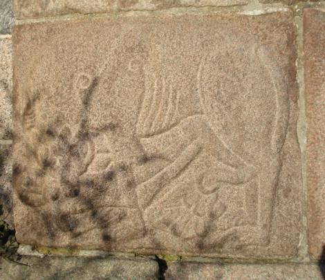 Mørke Kirke, granitskulptur / Moerke Church, Jutland, Denmark